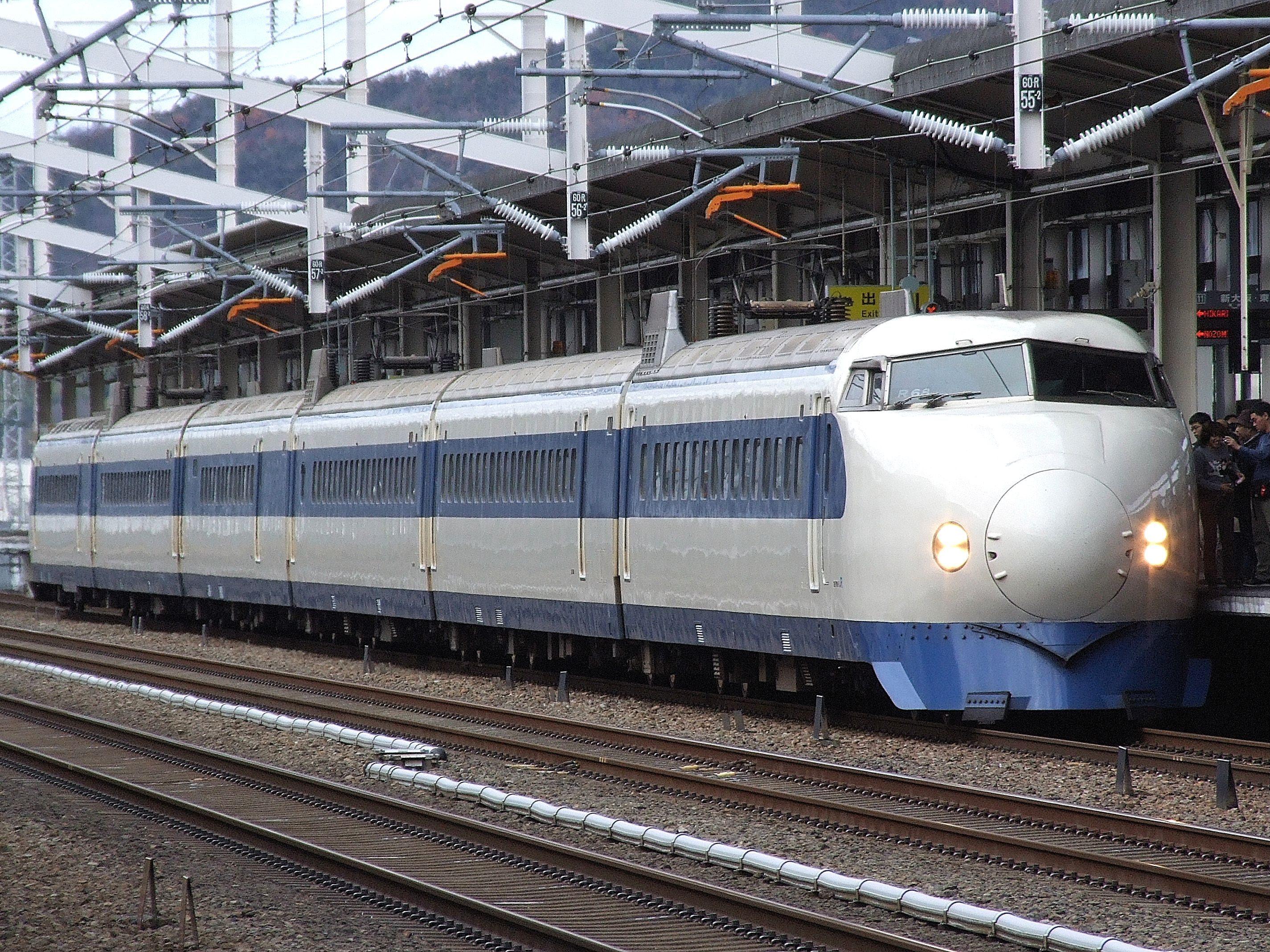 さよなら運転での臨時ひかり340号（2008年12月14日姫路駅）